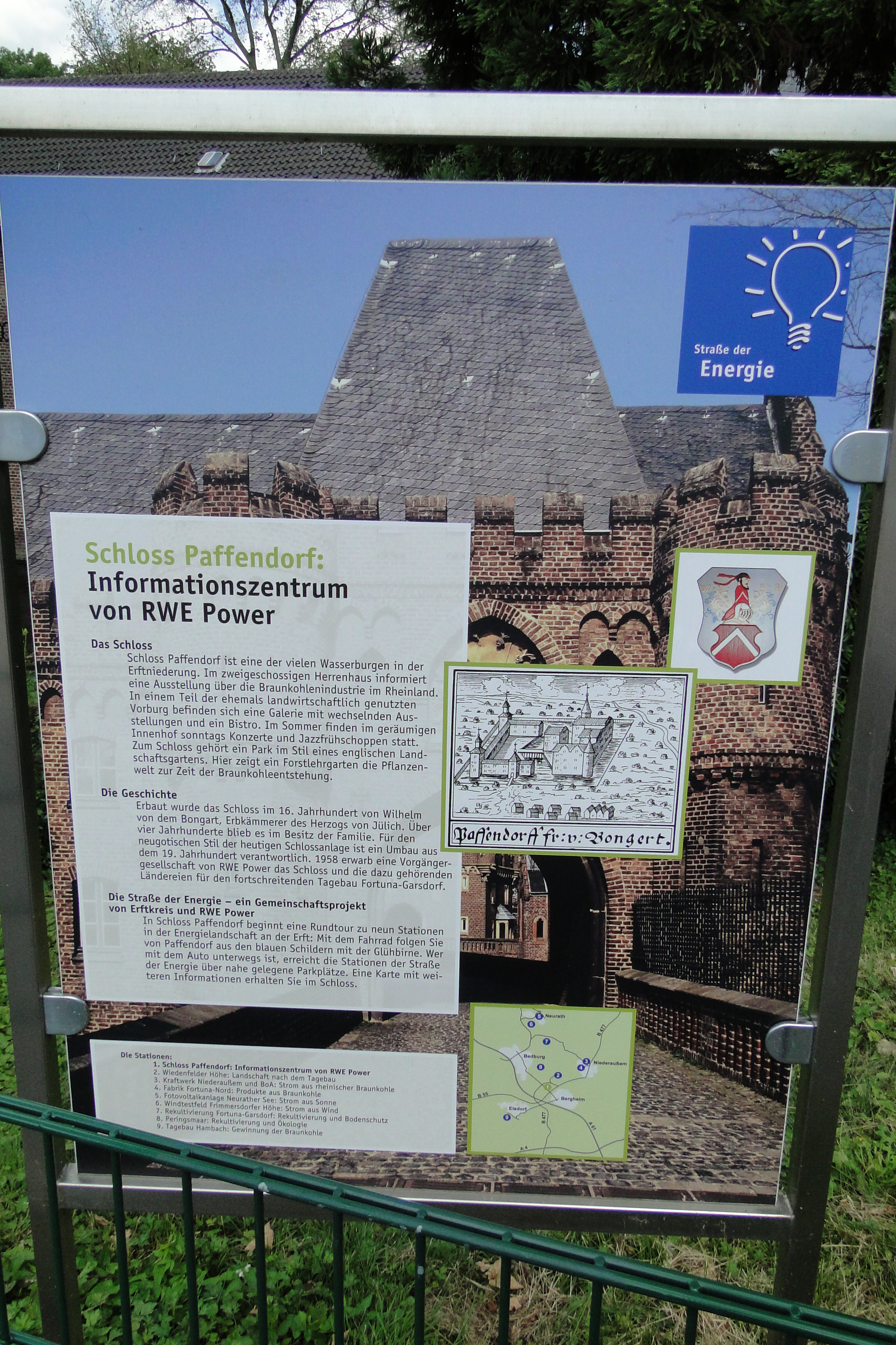 Schloss Paffendorf, Infotafel zum Informationszentrum von RWE Power, Straße der Energie